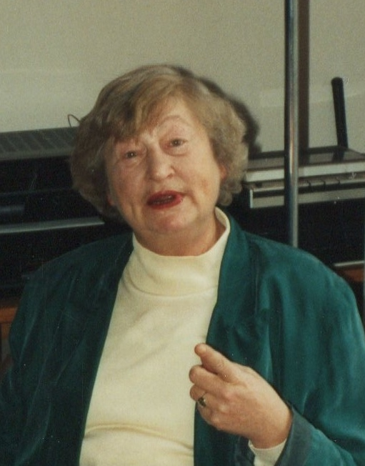 Helga Boddin, Moderatorin und stellvertretende Unterhaltungschefin des Norddeutschen Hörfunks